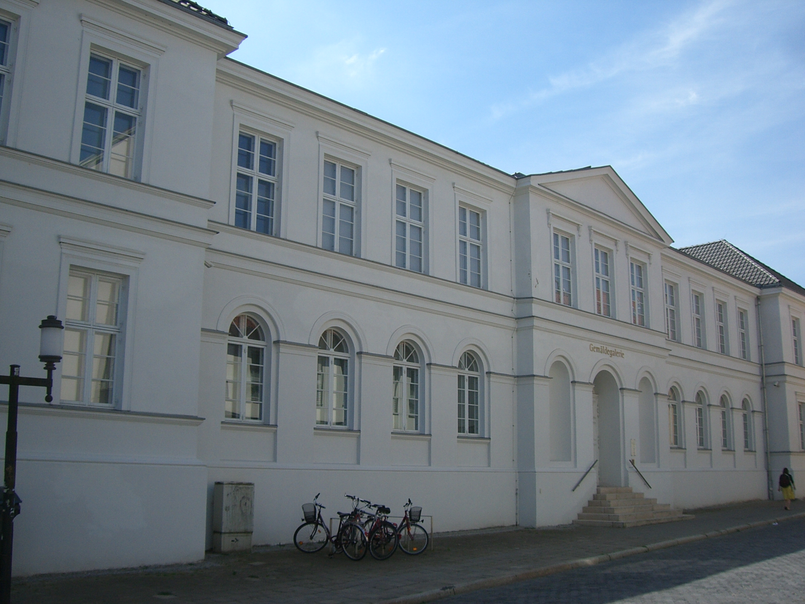 Greifswald